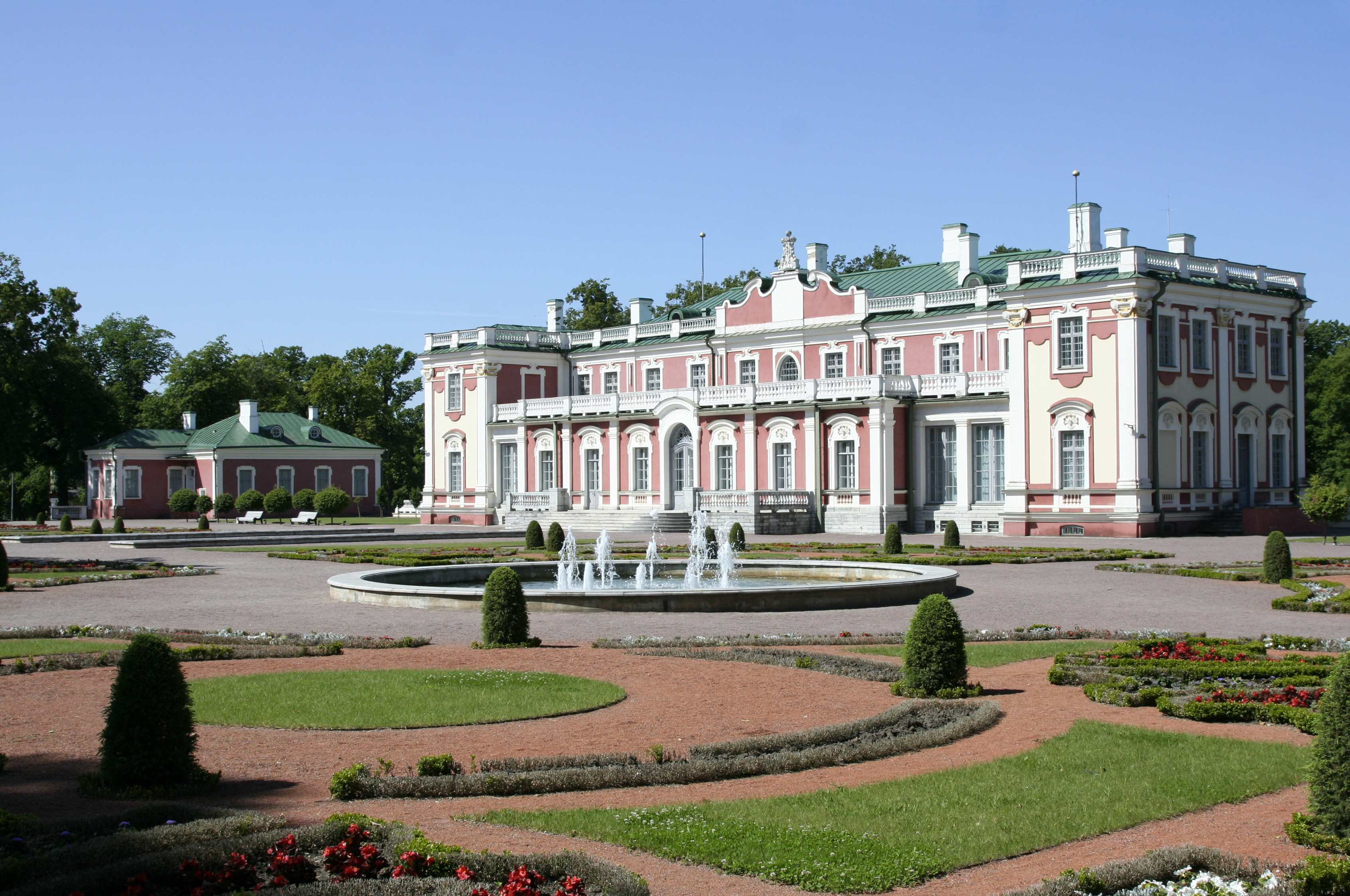 Kadrioru Kunstimuuseum